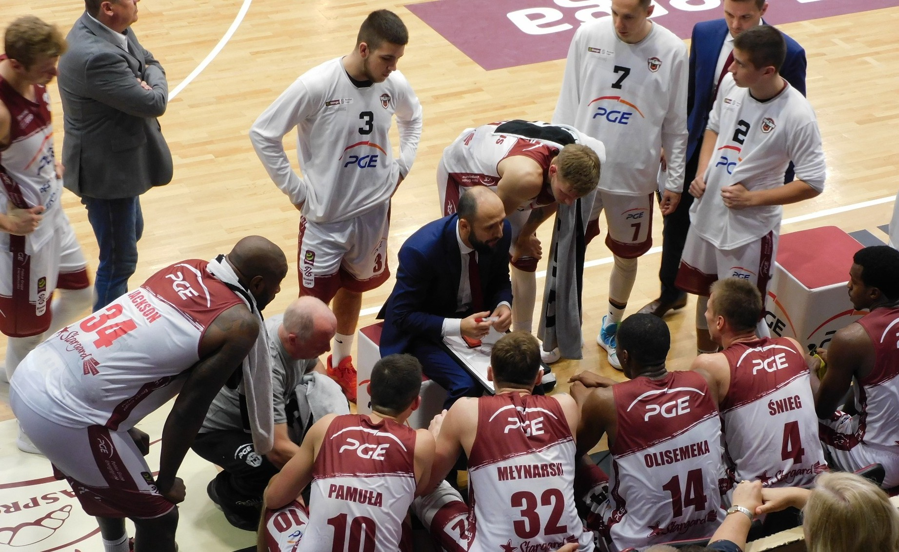 Stargard, 02.11.2019. PGE Spójnia Stargard